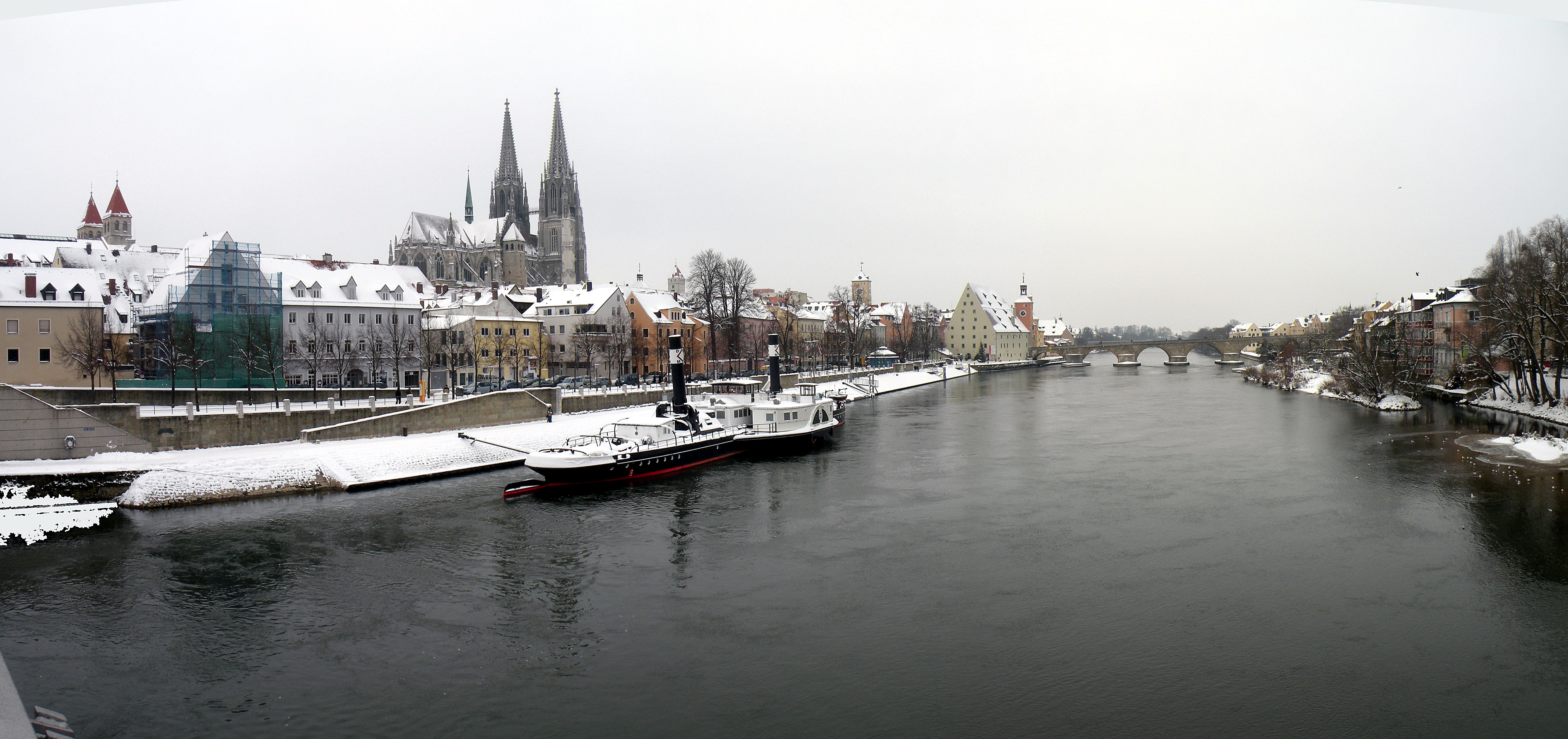 Дунай в Регенсбурге.